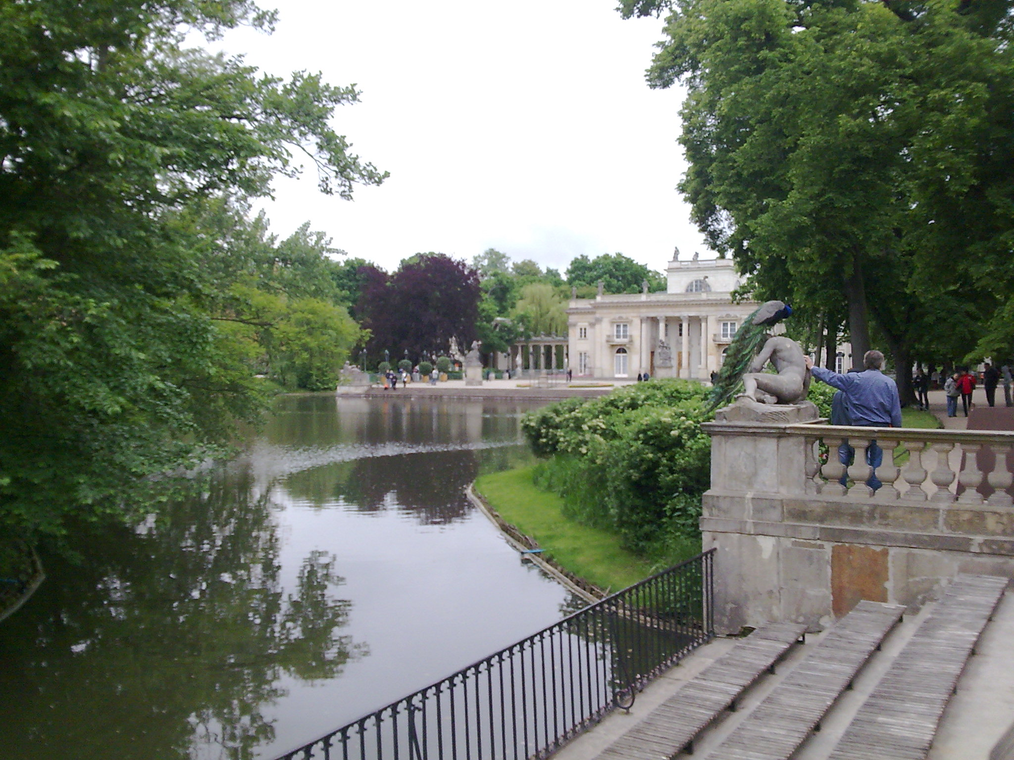 Na spacerze w Łazienkach